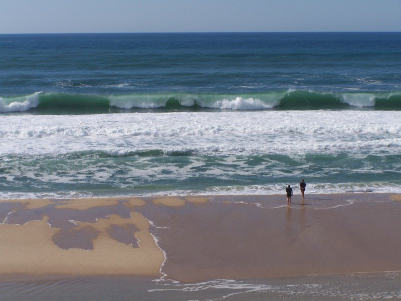 La plage